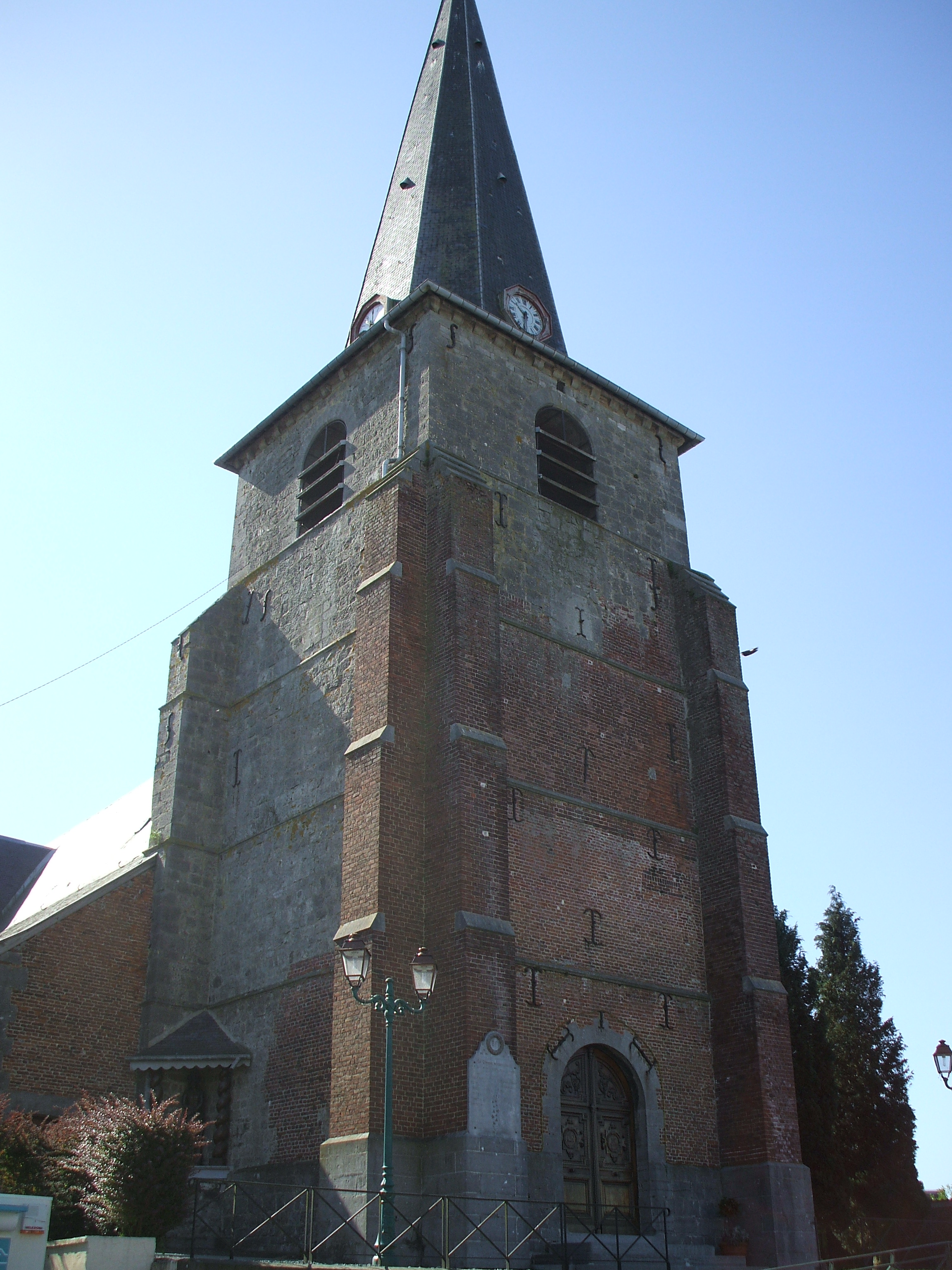 église de Cartignies Nord France